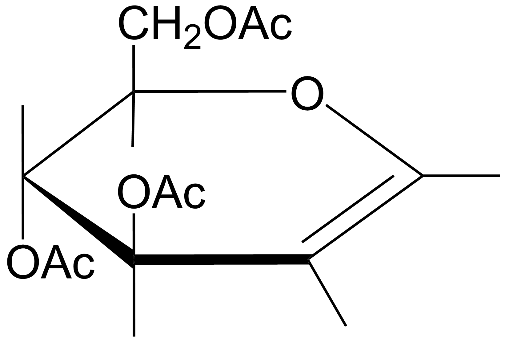 3,4,5-три-О-ацилглюкаль в проекции Фишера